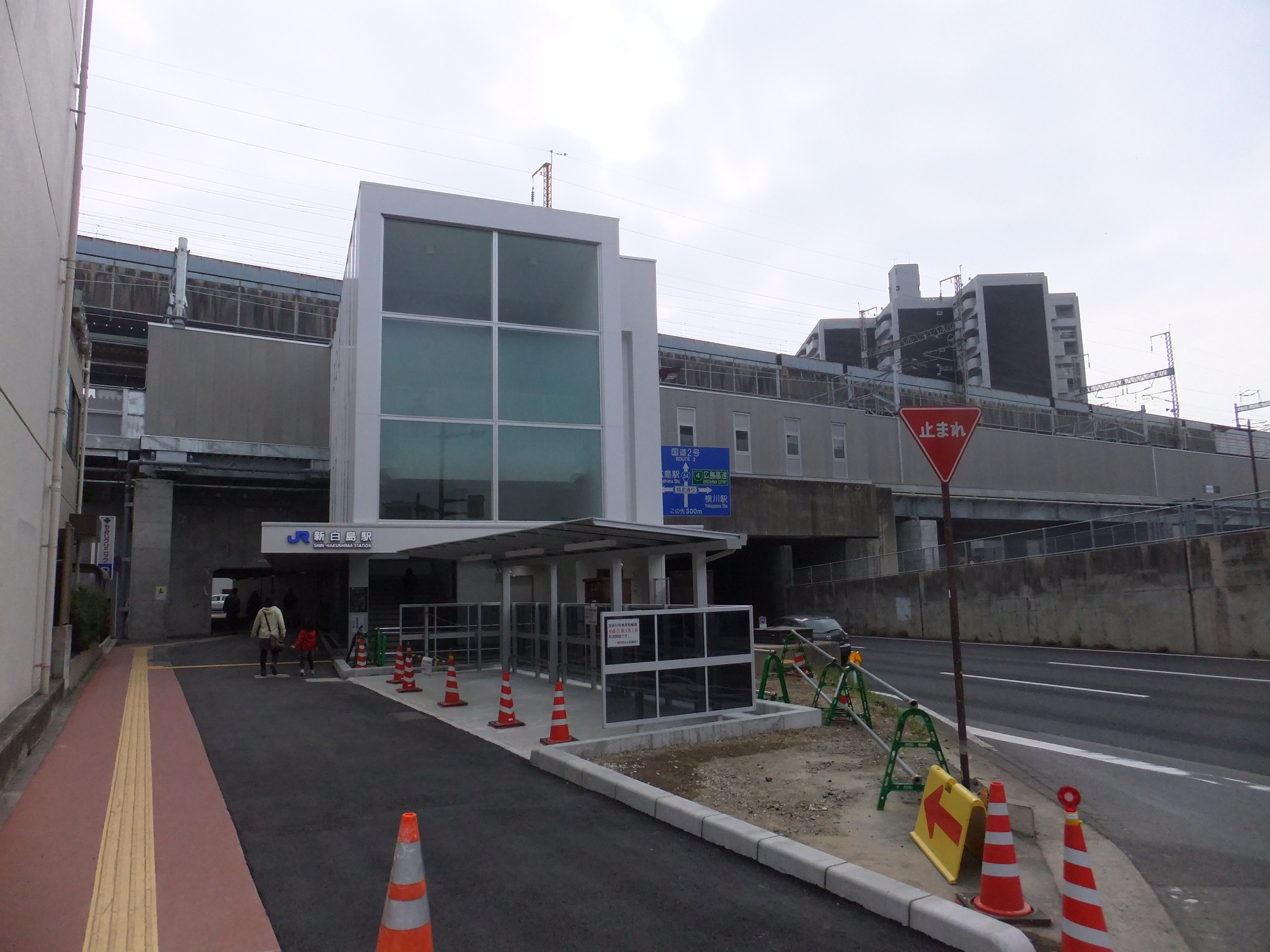 JR・新白島駅